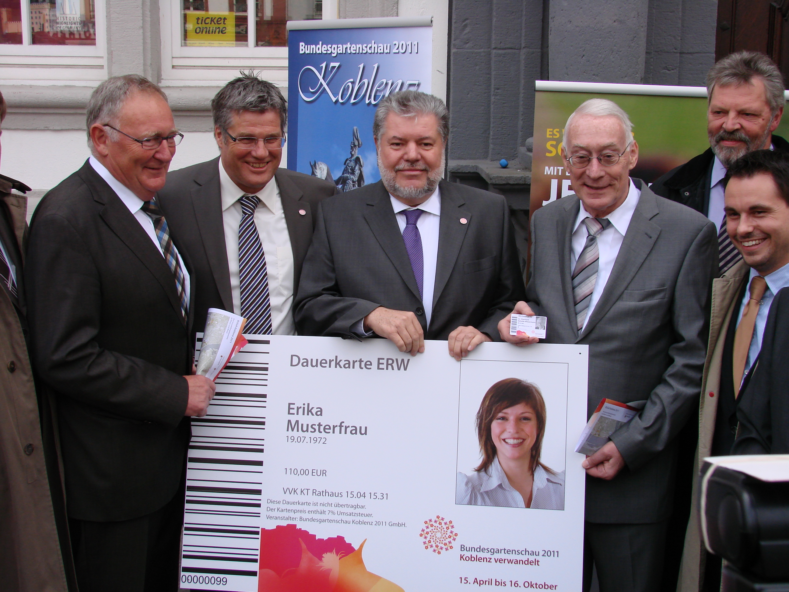 BUGA 2011-Geschäftsführer Hanspeter Faas (2.v.l.), Ministerpräsident Kurt Beck (3.v.l.) und der Koblenzer Oberbürgermeister Eberhard Schulte-Wissermann (3.v.r) eröffnen den Dauerkartenvorverkauf zur BUGA 2011